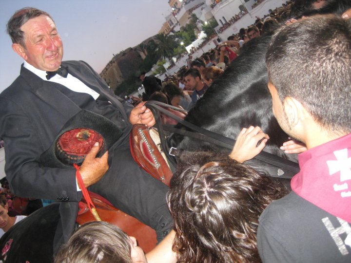 Fiesta de San Juan Bautista en Ciudadela This is a photography of a Folklore festival in Spain (Wikidata id Q11921915).